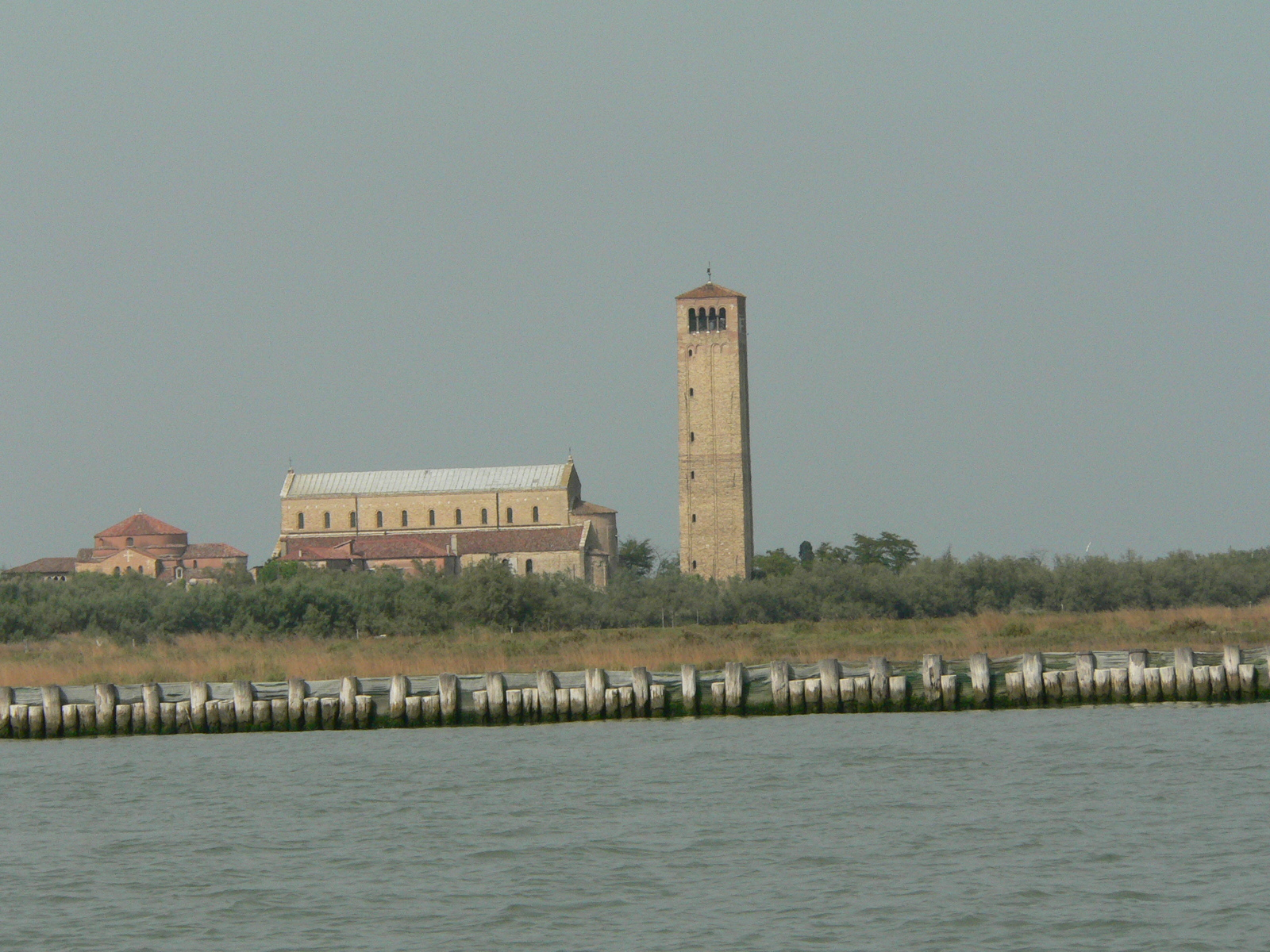 Torcello templomai a lagúna felől